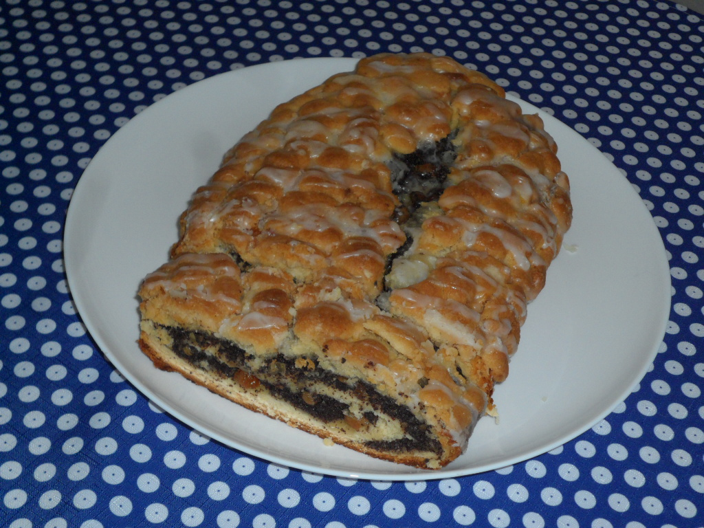 Schläsch: Schläscher Mohstriezel